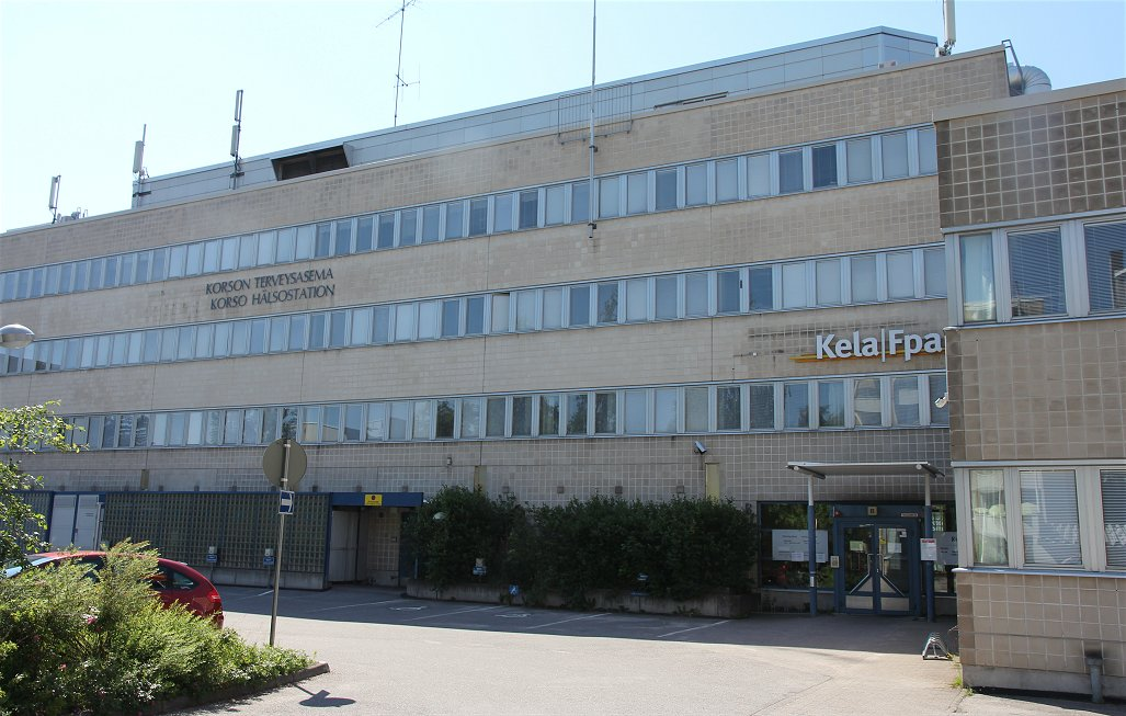 Korson terveysasema on Vantaan Korson suuralueella, Metsolan kaupunginosassa sijaitseva terveysasema.